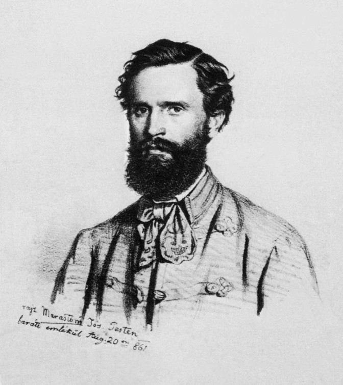 Marastoni József: Orlai Petrics Soma (litográfia, 1861) forrás